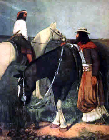 Capataz y Peón de Campo (Foreman and a Farm Worker)